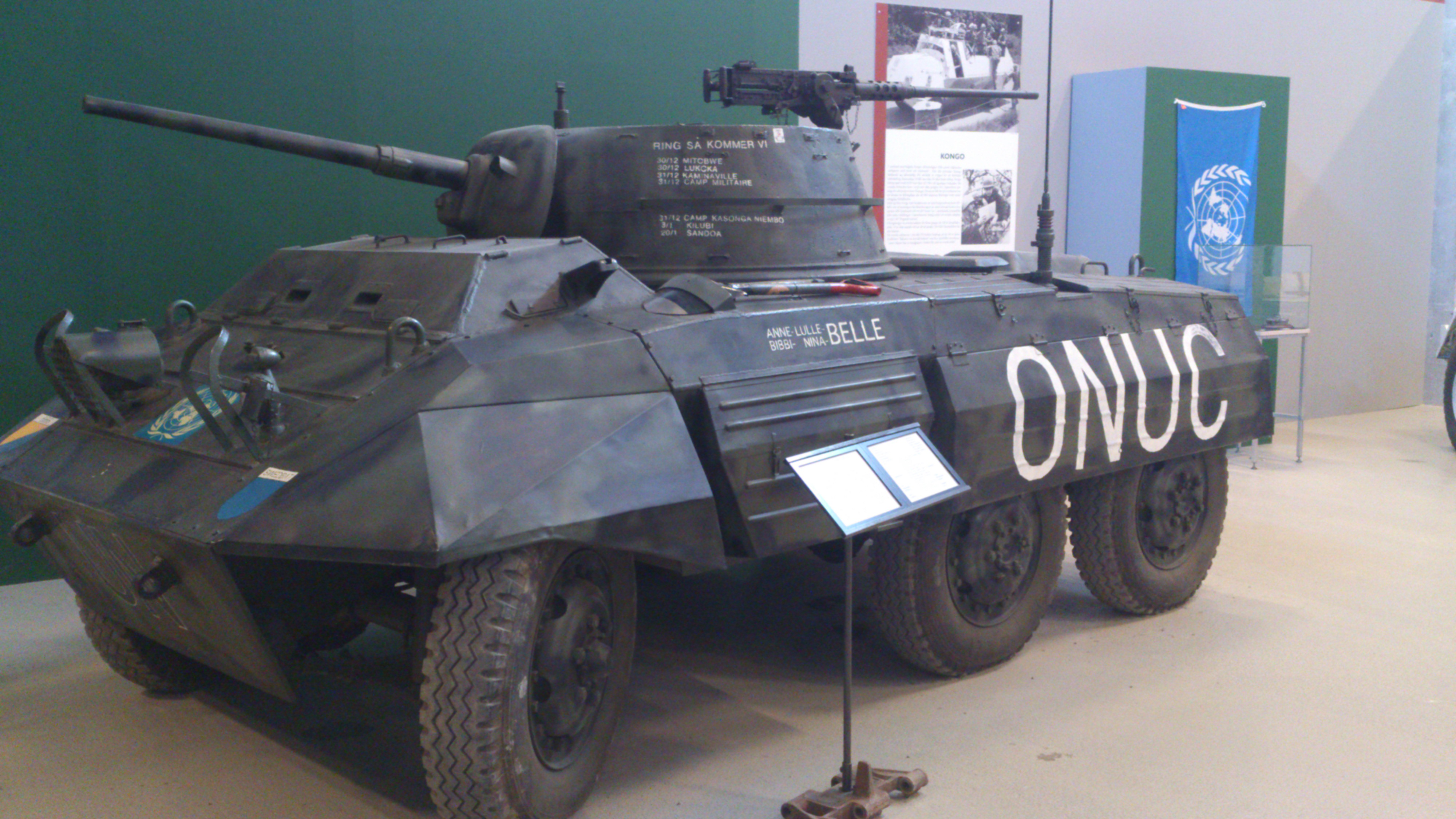 GAK M8 Greyhound på Försvarsfordonsmuseet Arsenalen i Strängnäs.